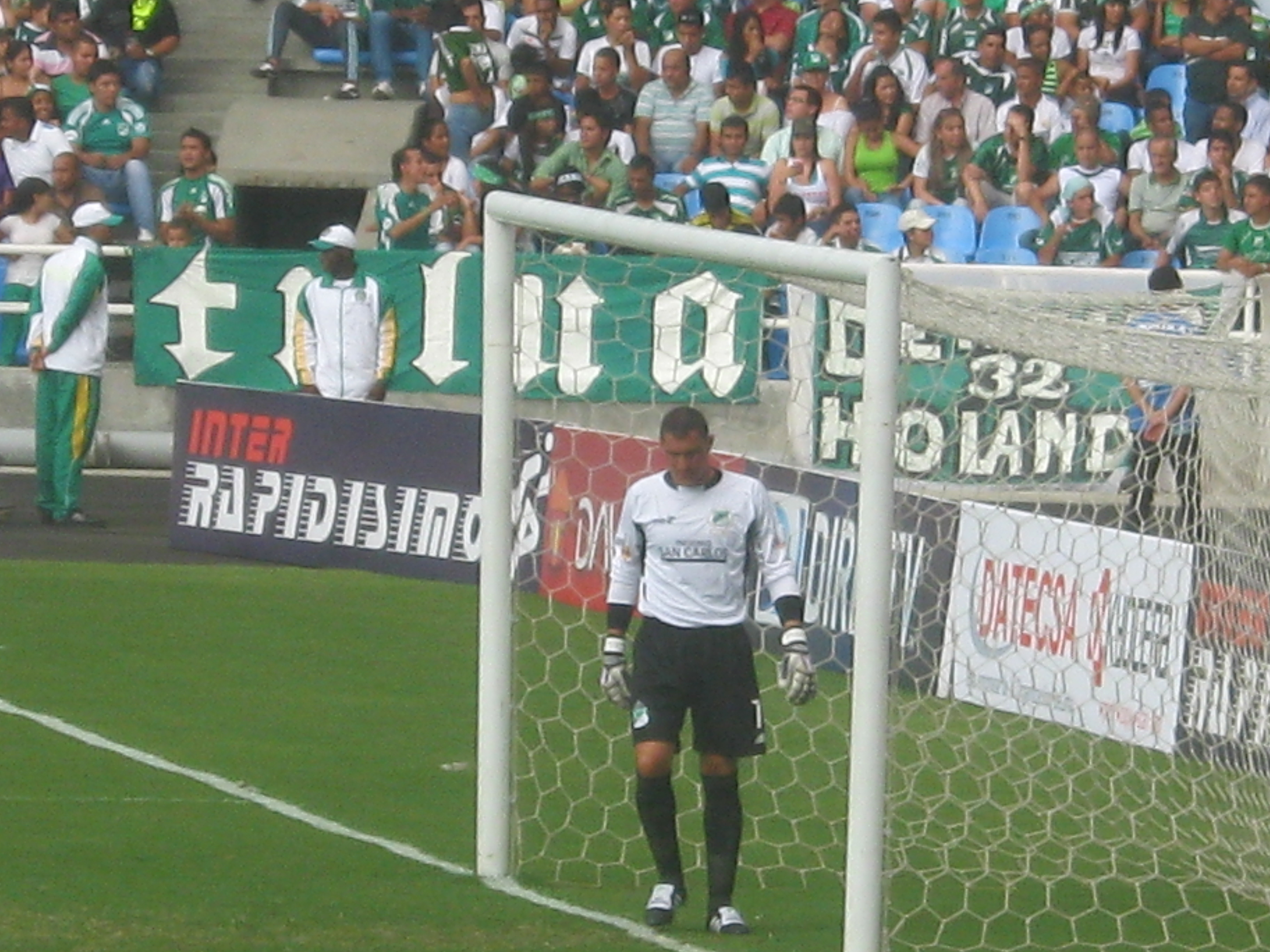 Faryd Mondragón en la portería del Super Depor